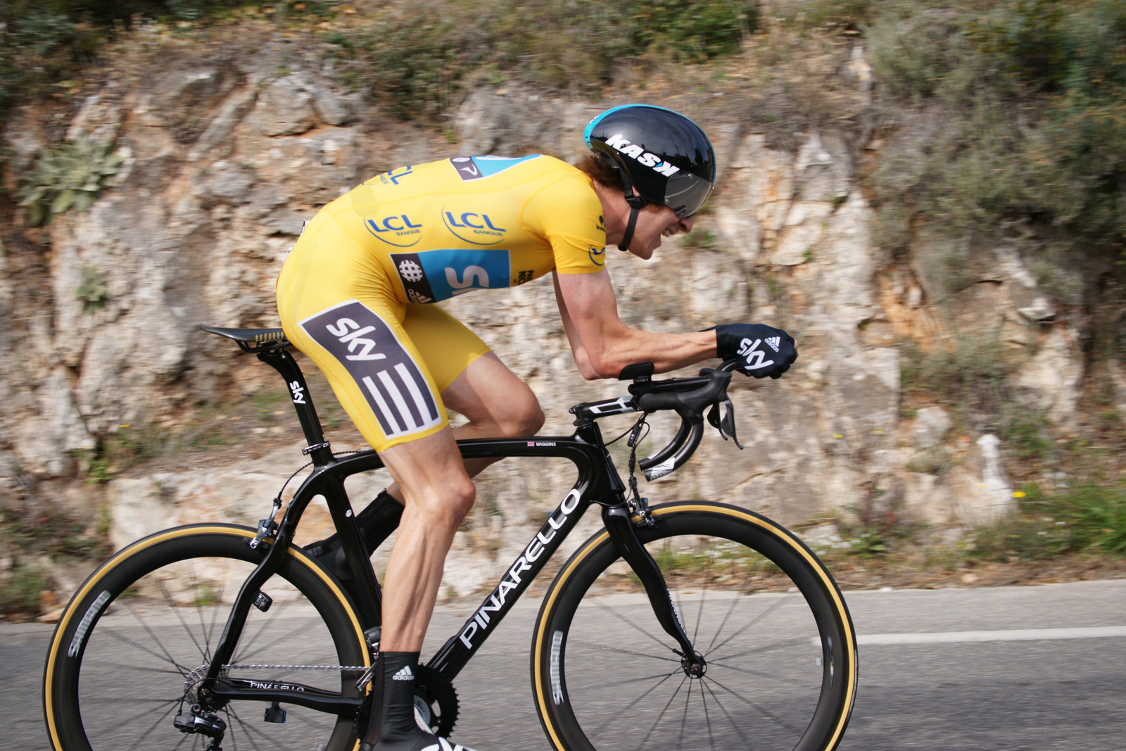 Bradley Wiggins, col d'Eze paris-Nice 2012